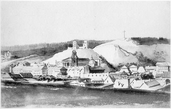 Pilių panorama